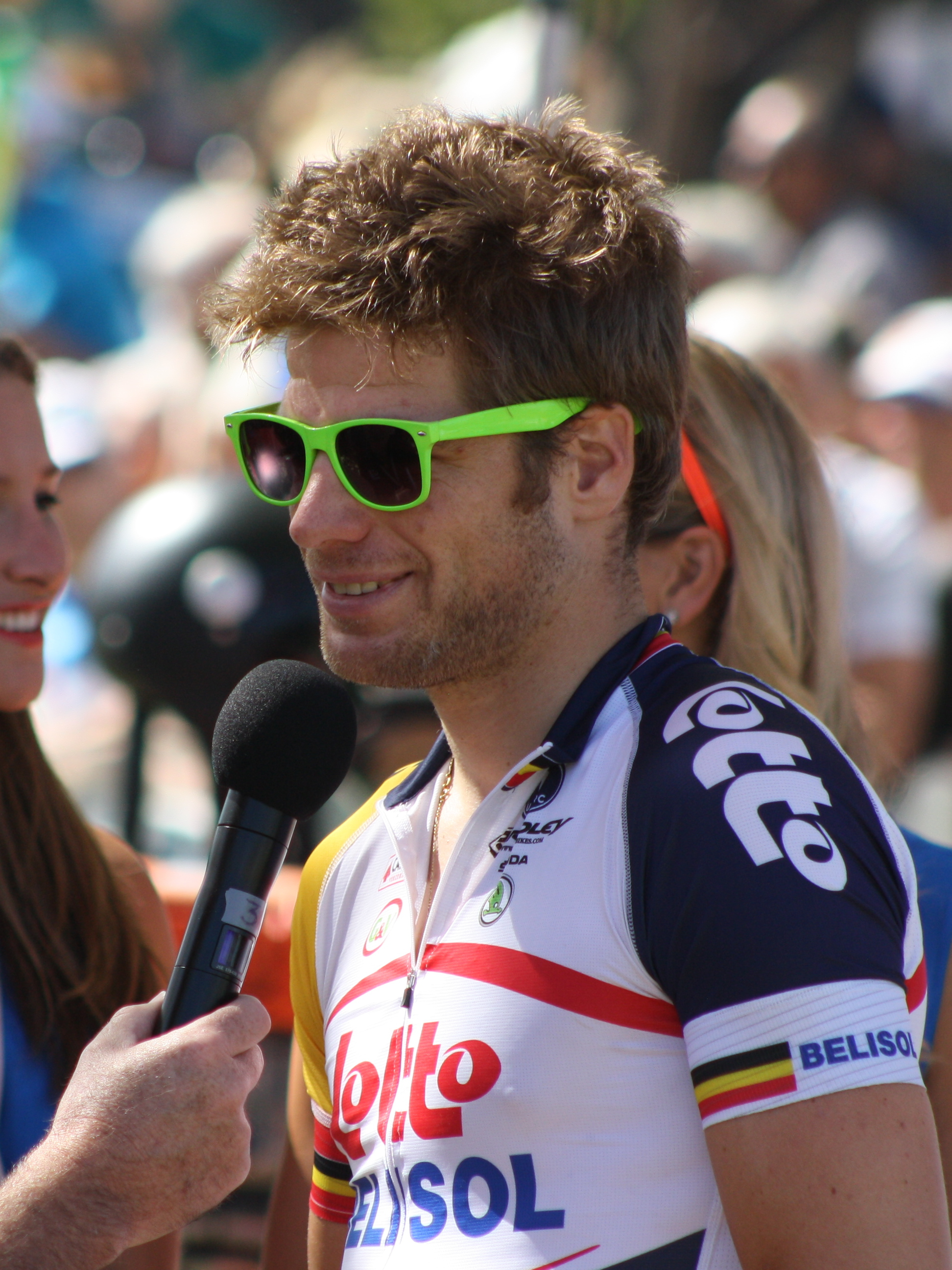 Roelandts